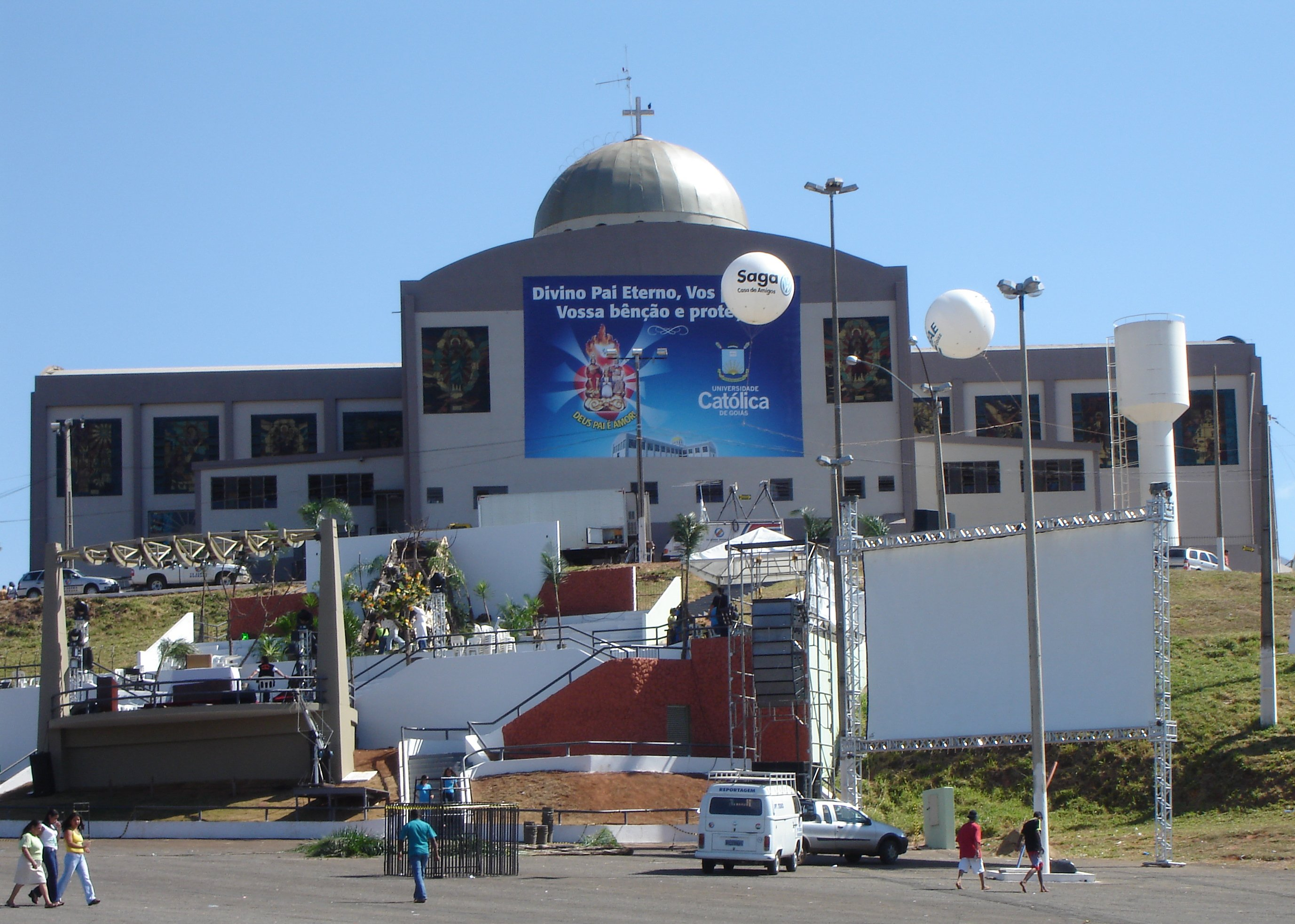 Basílica do Divino Pai Eterno, Trindade, Goiás, Brasil.